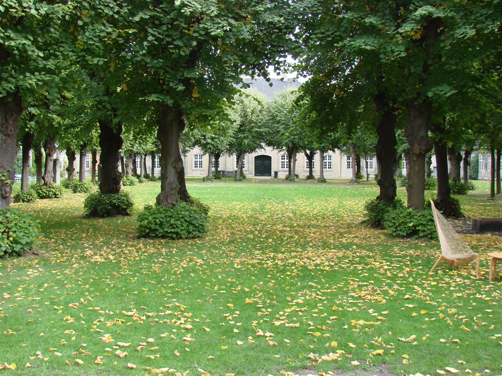 Innehof/Garten des Kunstindustrimuseet Kopenhagen.